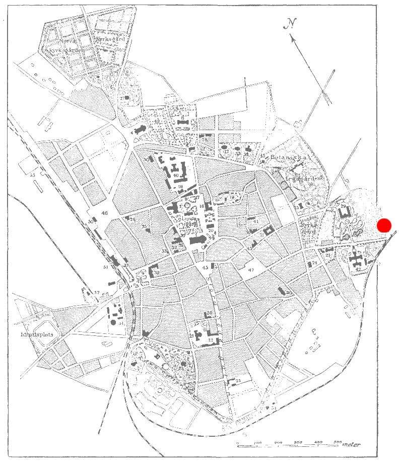 Karta över Lund med Lunds östra station markerat.